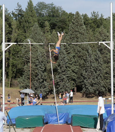 Scattata da Nefersaur sequenza salto con l'asta 4 (Anna Giordano Bruno) Licenza